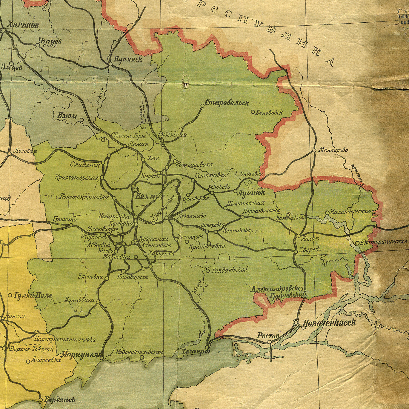 Донецька губернія, фрагмент мапи Української соц. рад. республіки, листопад 1921